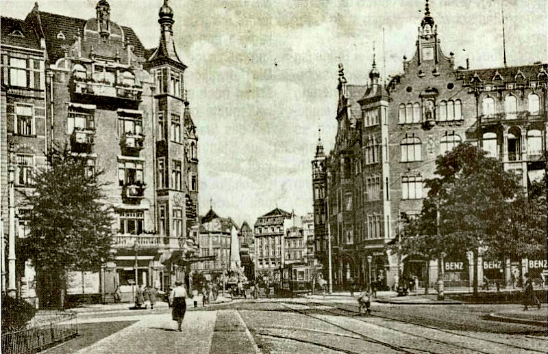 Ulica Hucisko w Gdańsku, w głębi Targ Drzewny z niemieckim pomnikiem zwycięstw. Budynek po lewej mieścił hotel Deutsches Haus.